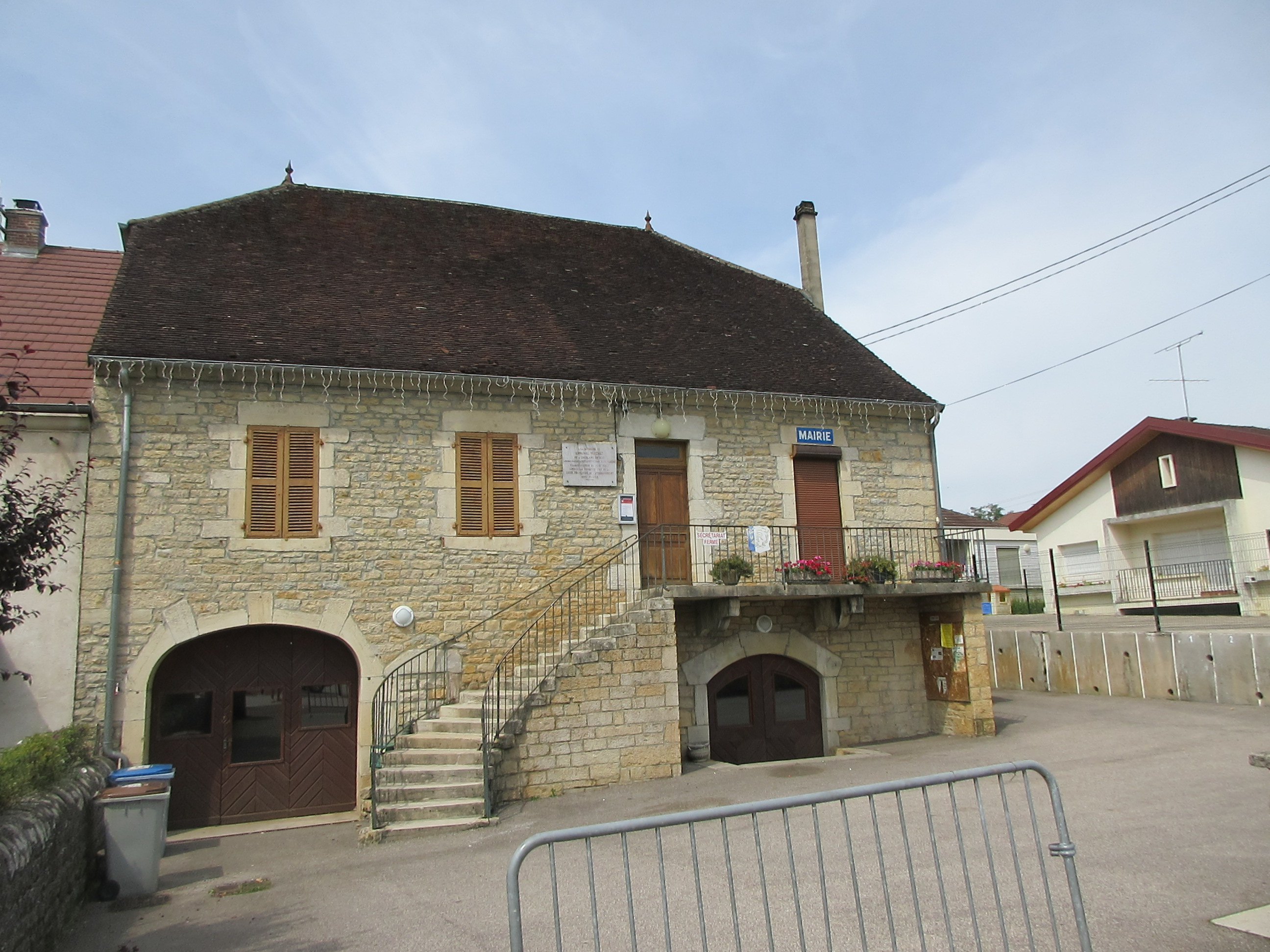 Mairie de Courlans.